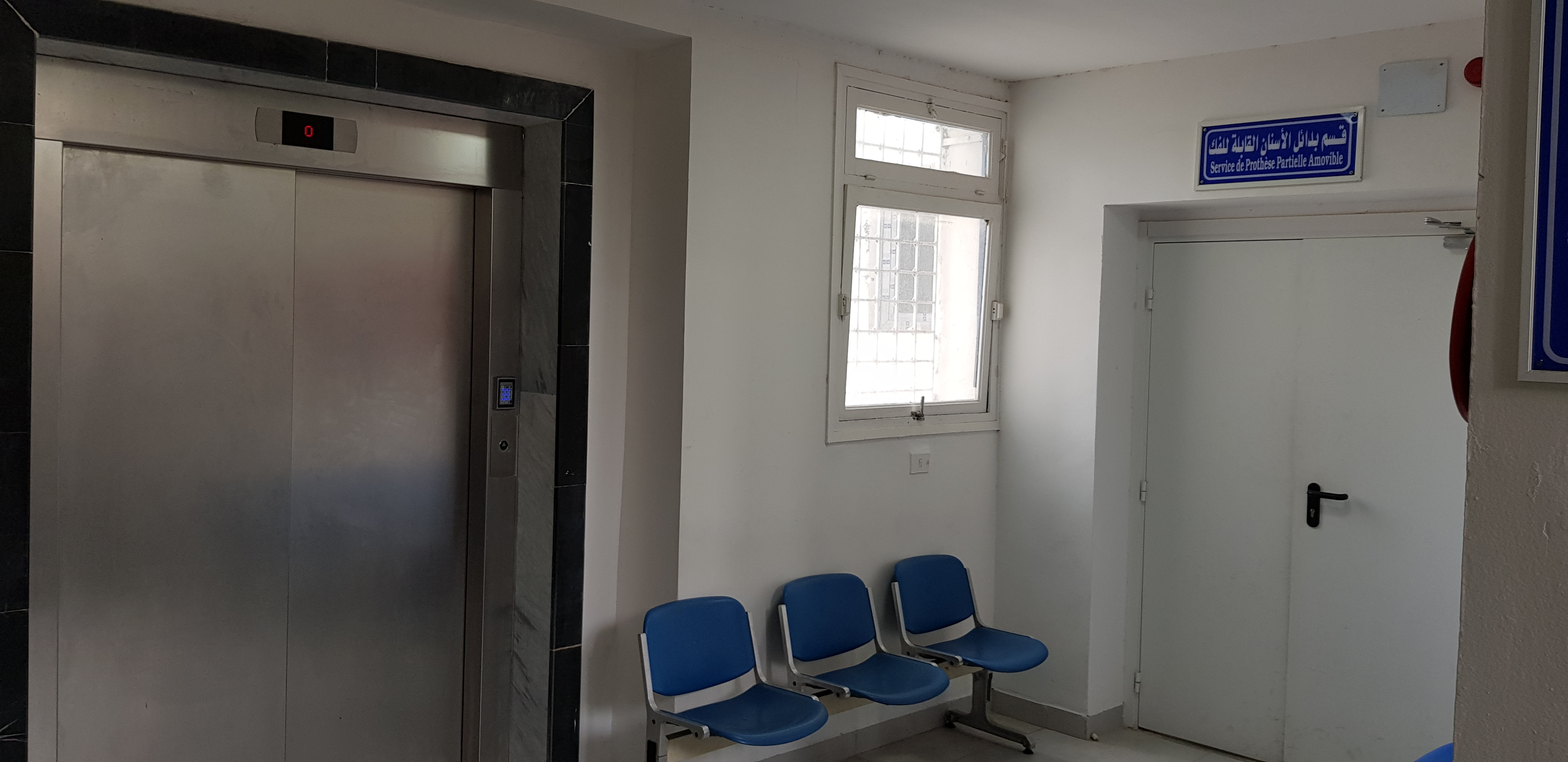 clinique FMDM